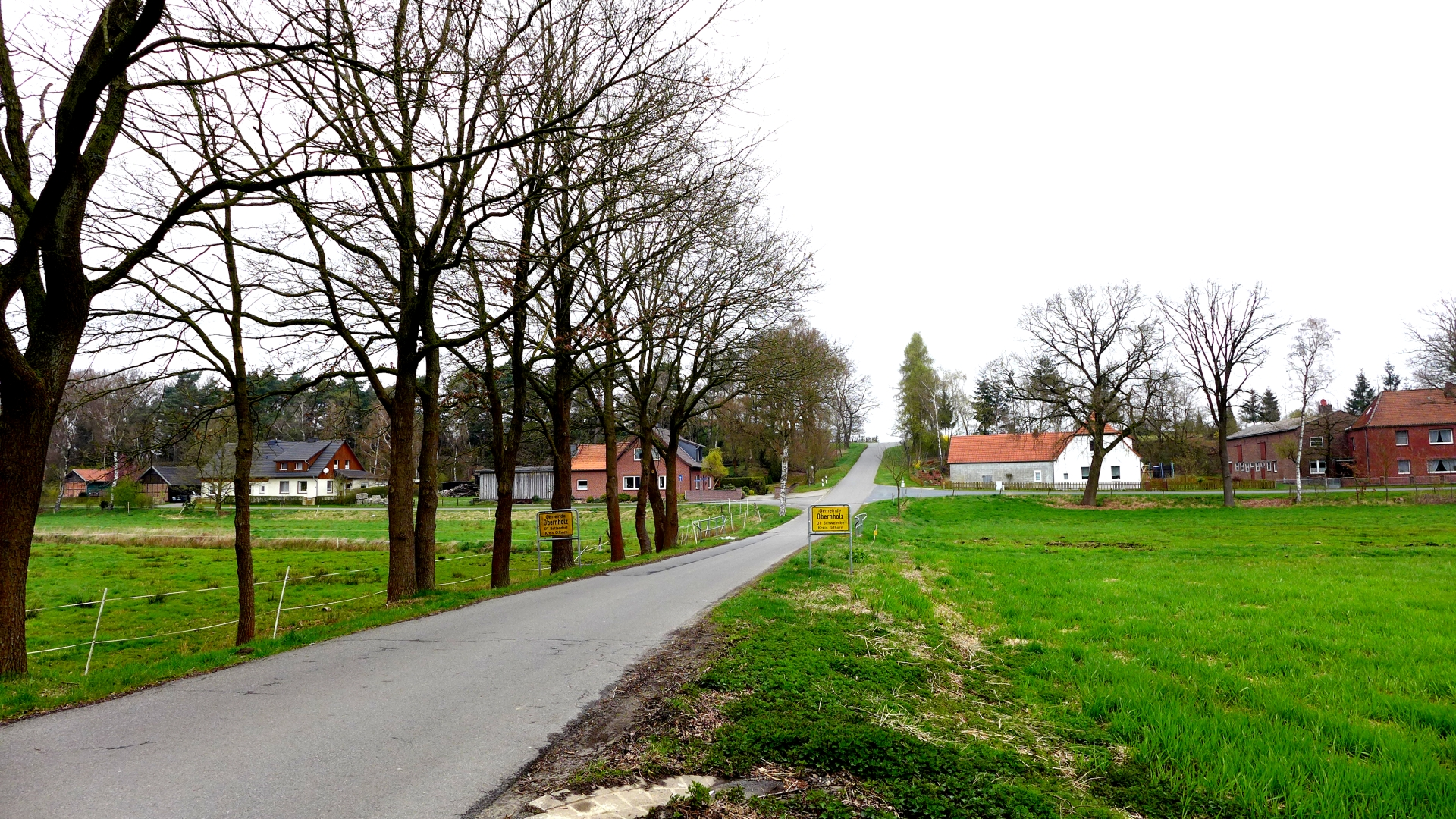 Ortseingang der Gemeinde Obernholz, von Bottendorf kommend. Zwischen den Ortseingangsschildern und der Anhöhe Am Sandberg fließt der Bottendorfer Bach. Aufnahmedatum 2016-04.